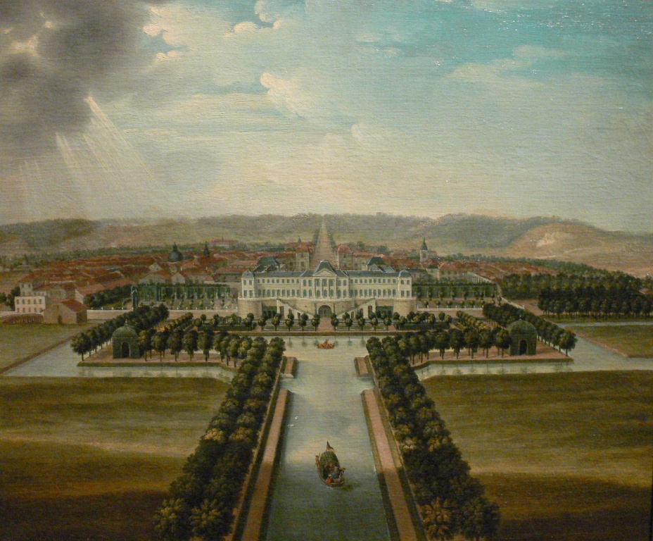 Vue du Château et de la ville de Commercy depuis le pavillon des cascades des jardins (XVIII°)